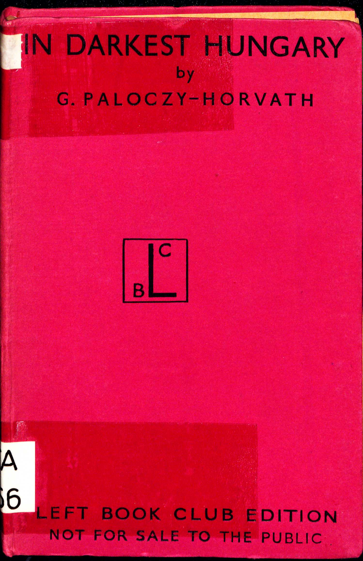 György Pálóczi Horváth In Darkest Hungary 1944 cover